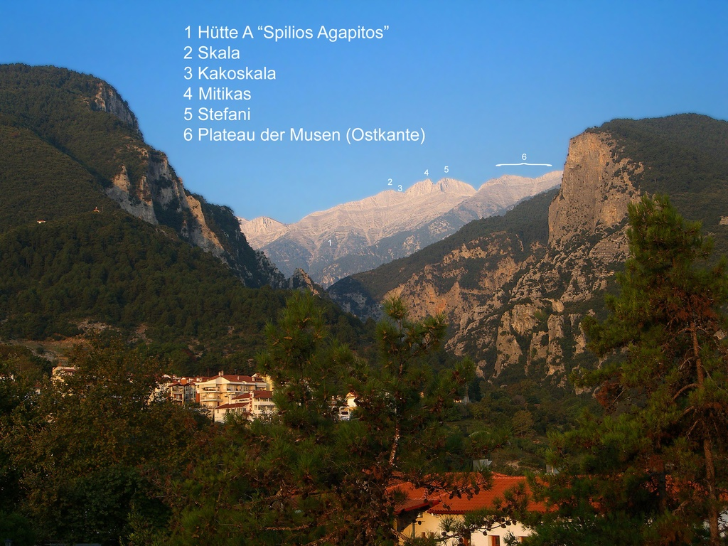 Olympgipfel von Litohoro aus